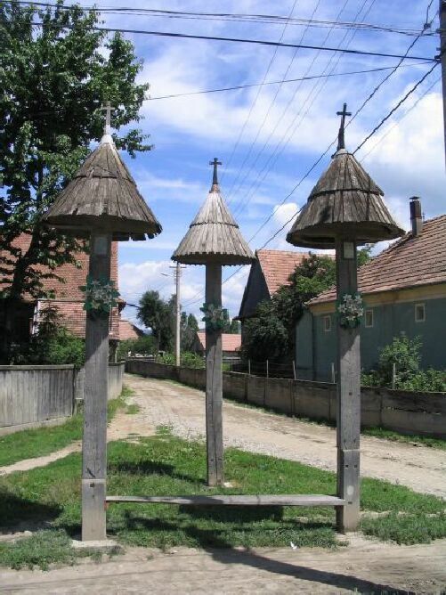 Csíkcsekefalva, 2005